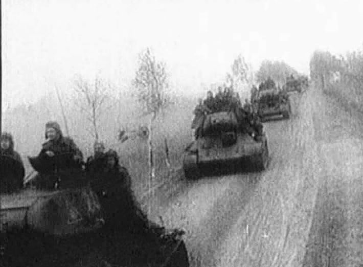 Carri sovietici T-34/85 del 3° Corpo carri.